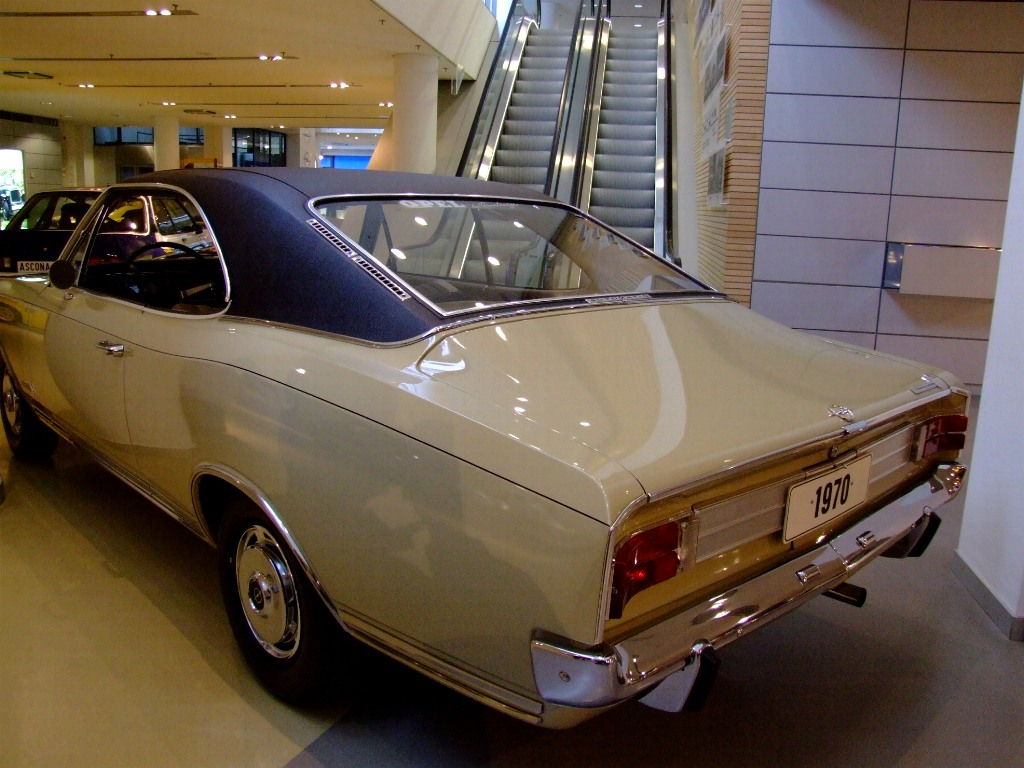 Opel Commodore A 2500